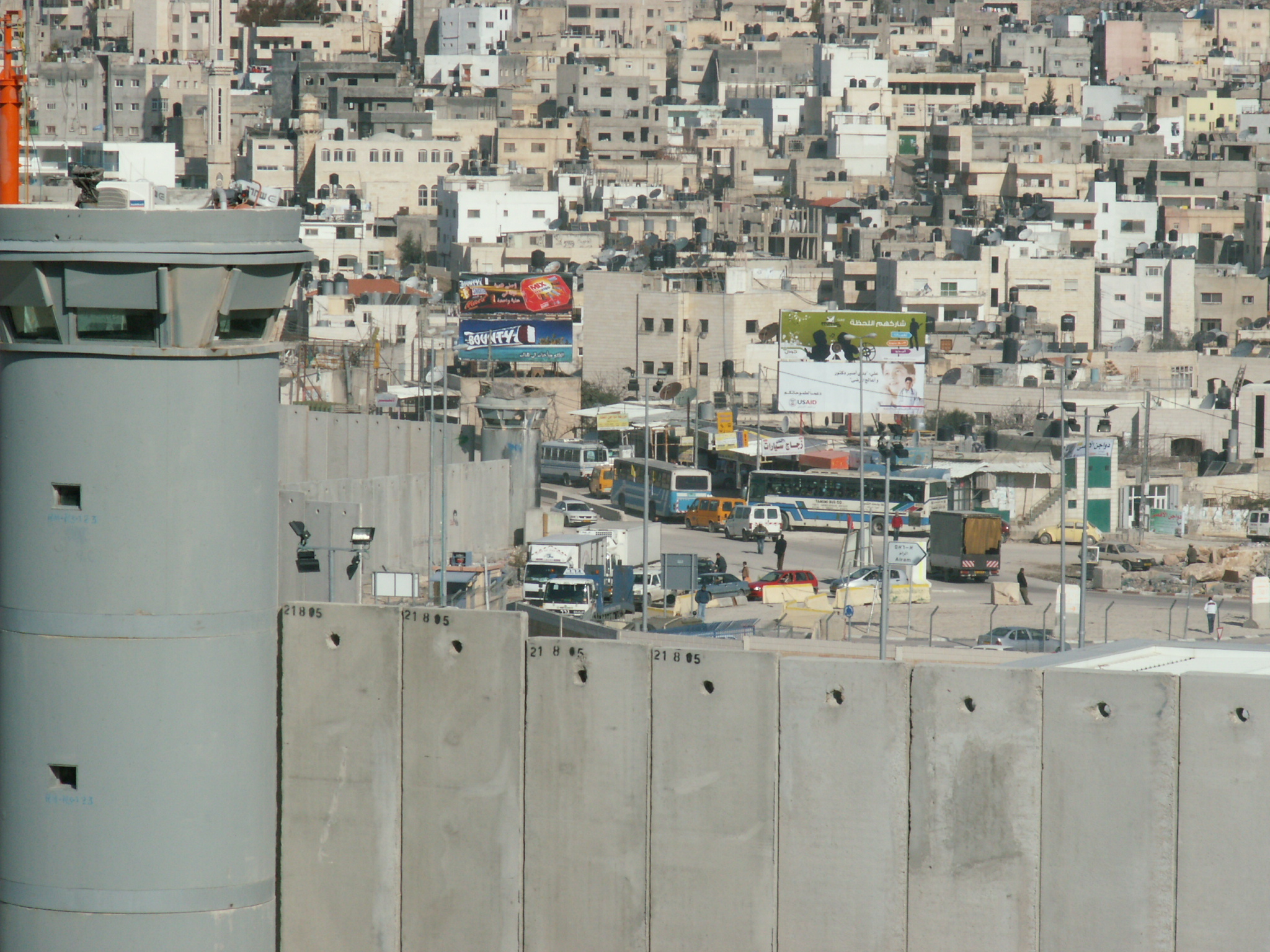 Foto: Christian Sterzing